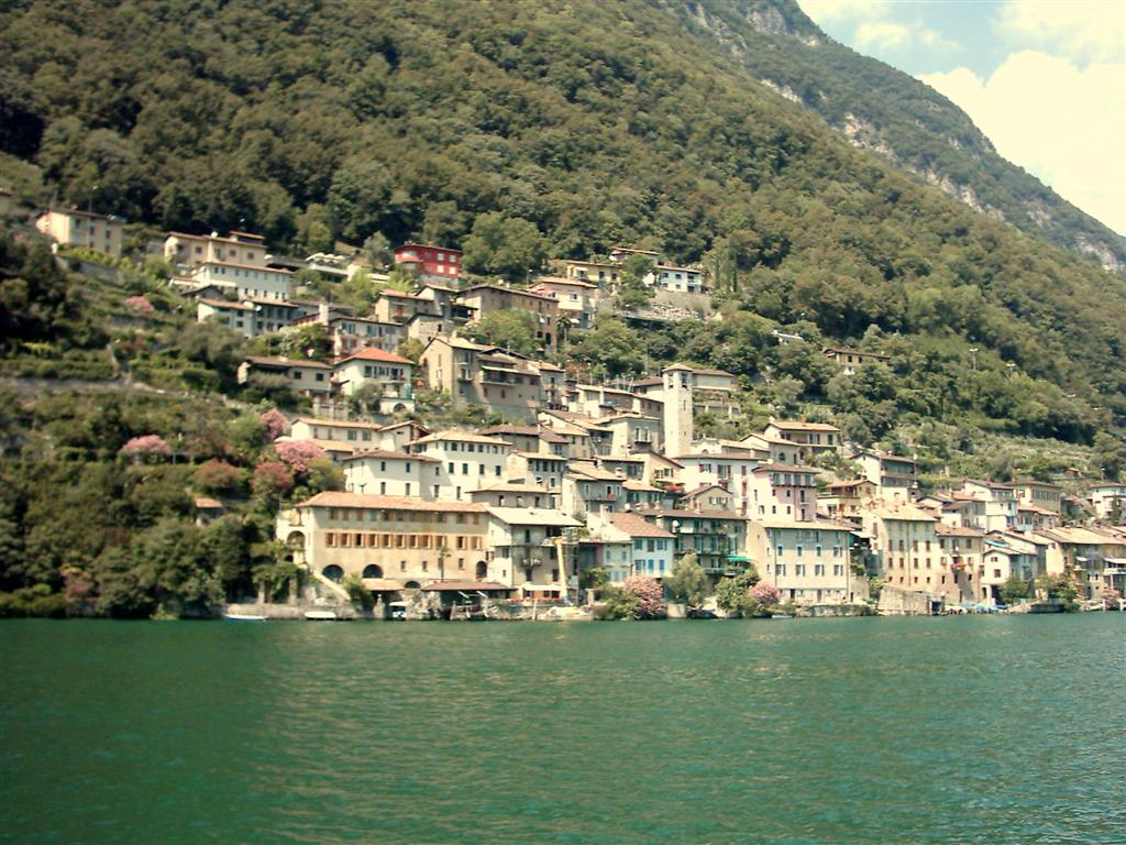 Gandria, Lake Lugano (Switzerland) Afbeelding is vrij van auteursrechten, en dus vrij te gebruiken